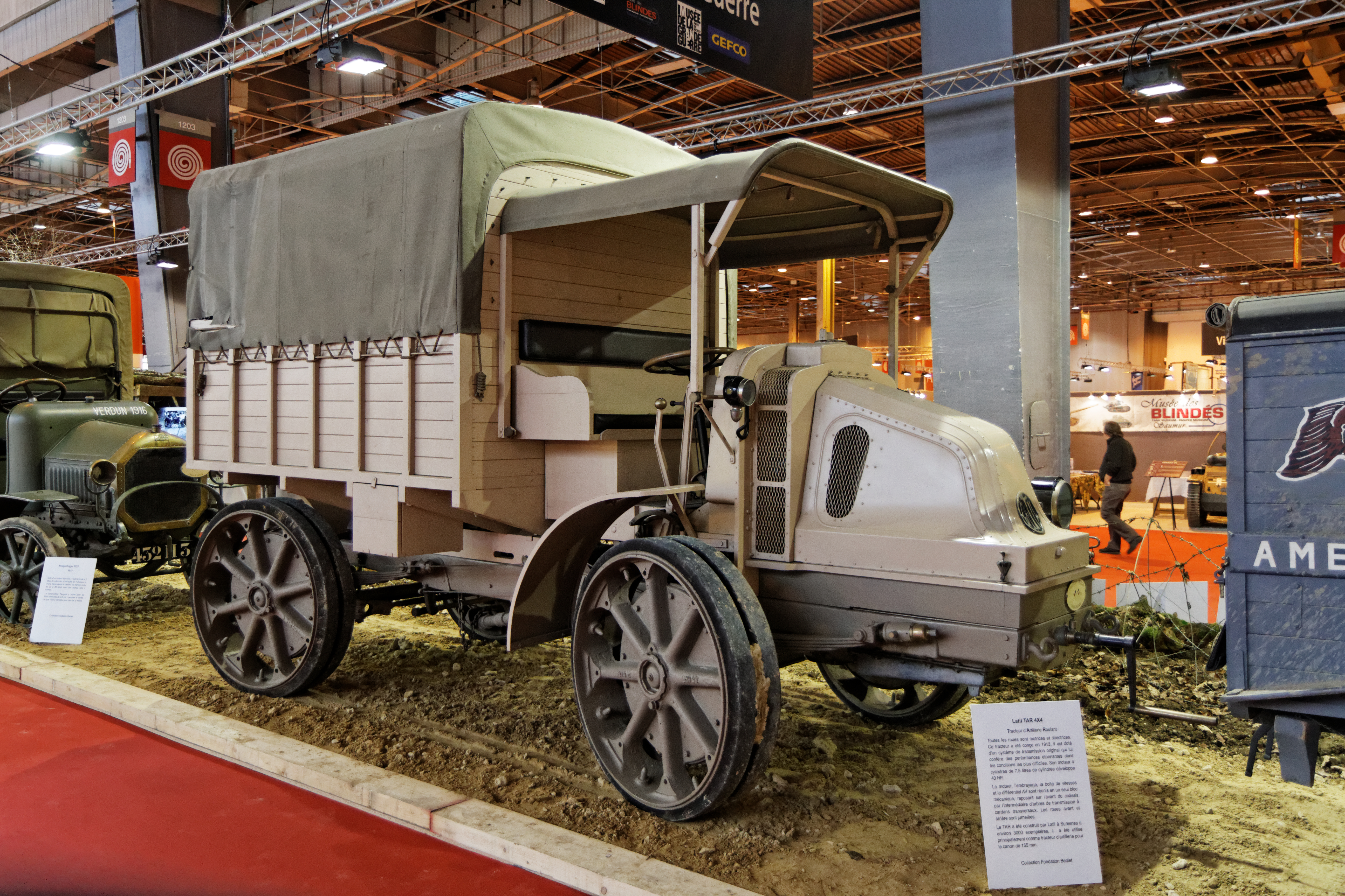 Un Latil TAR 4X4 présenté lors du salon Retromobile 2014.